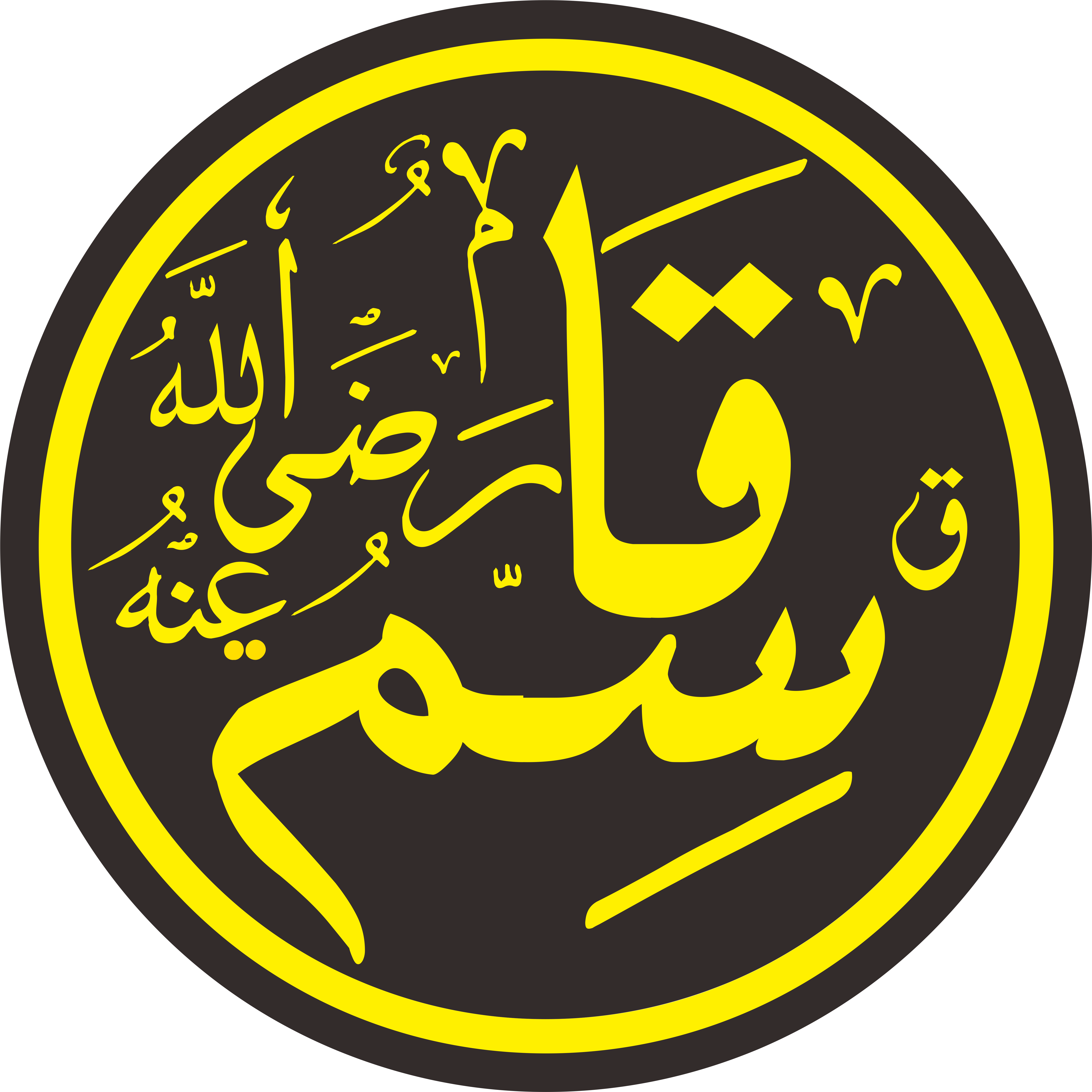 imam qasim